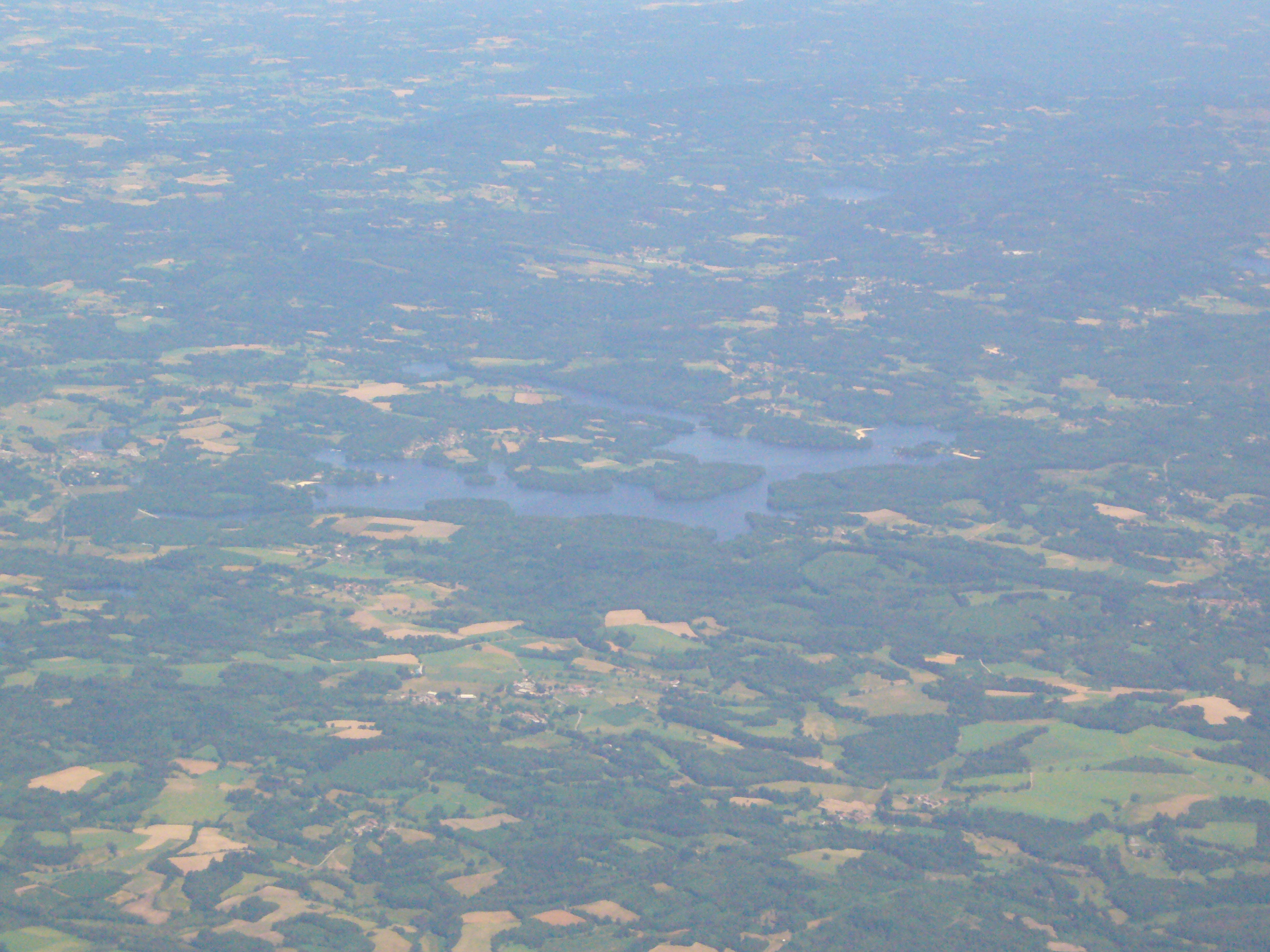 Vue aérienne du lac de Saint-Pardoux (Haute-Vienne, France)